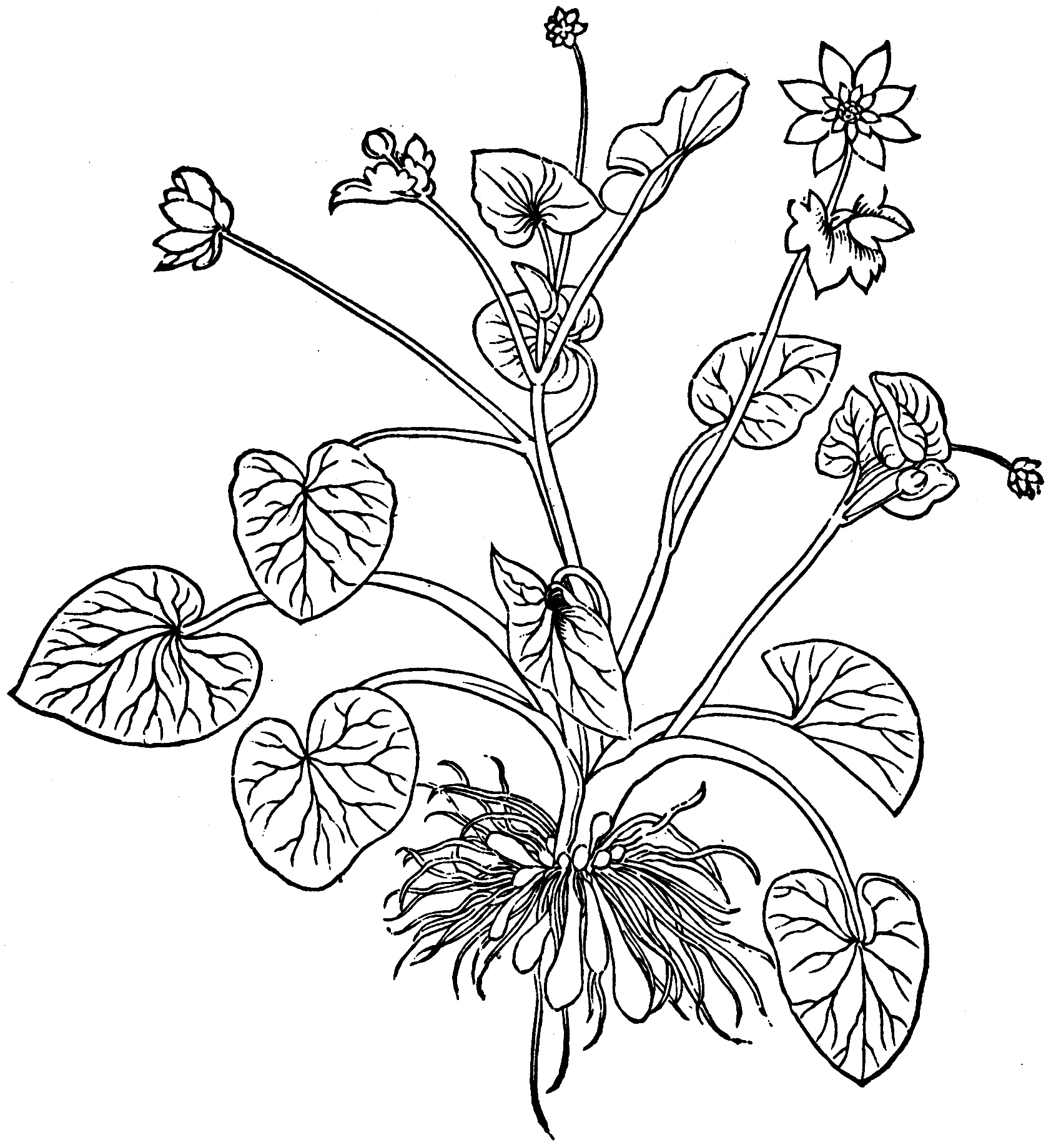 Abbildung von Feigwartzenkraut